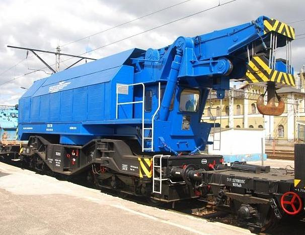 Dźwig pociągu ratunkowego PKP PLK